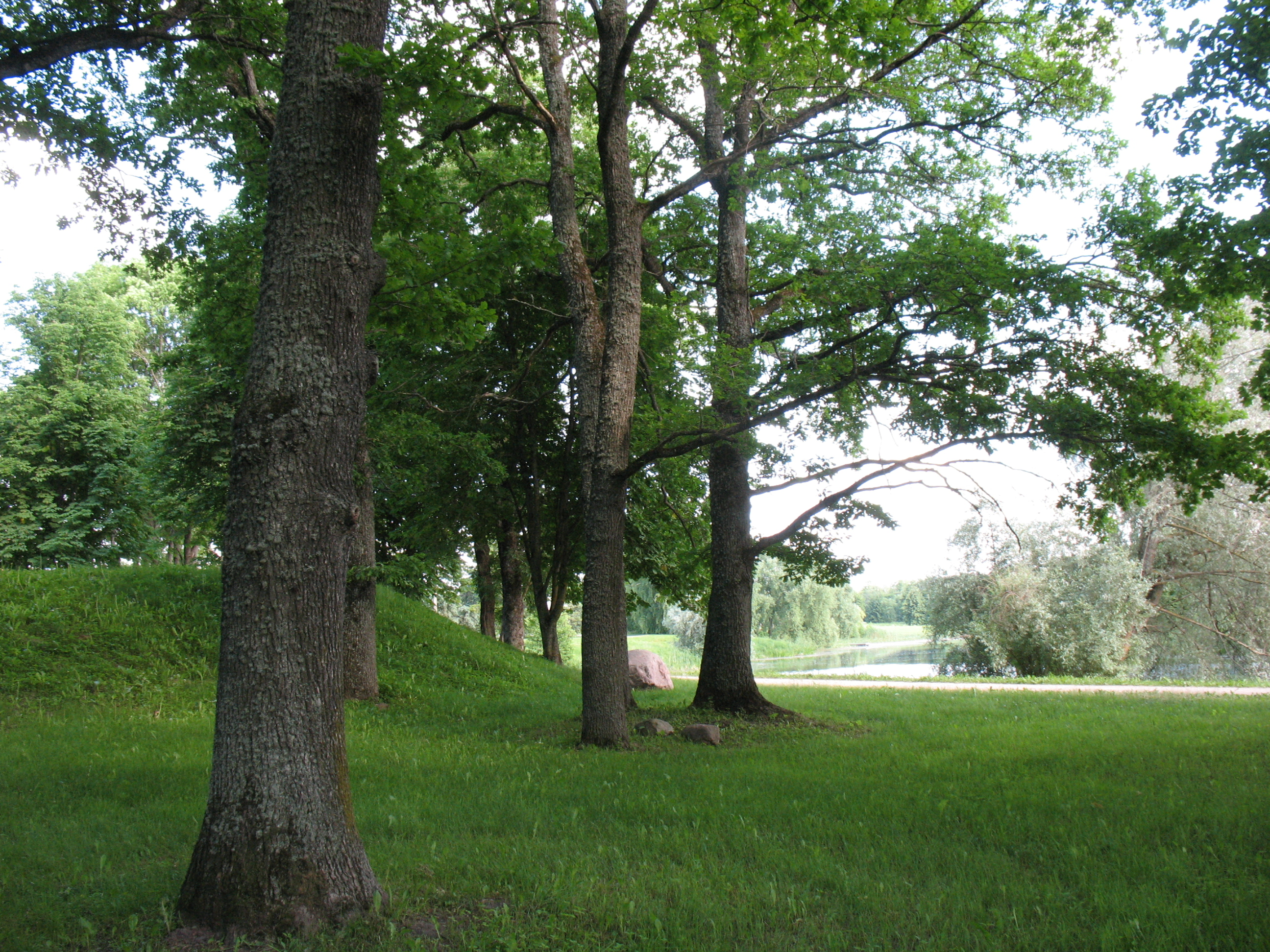 Tartu maakond, Rannu vald, Rannu alevik